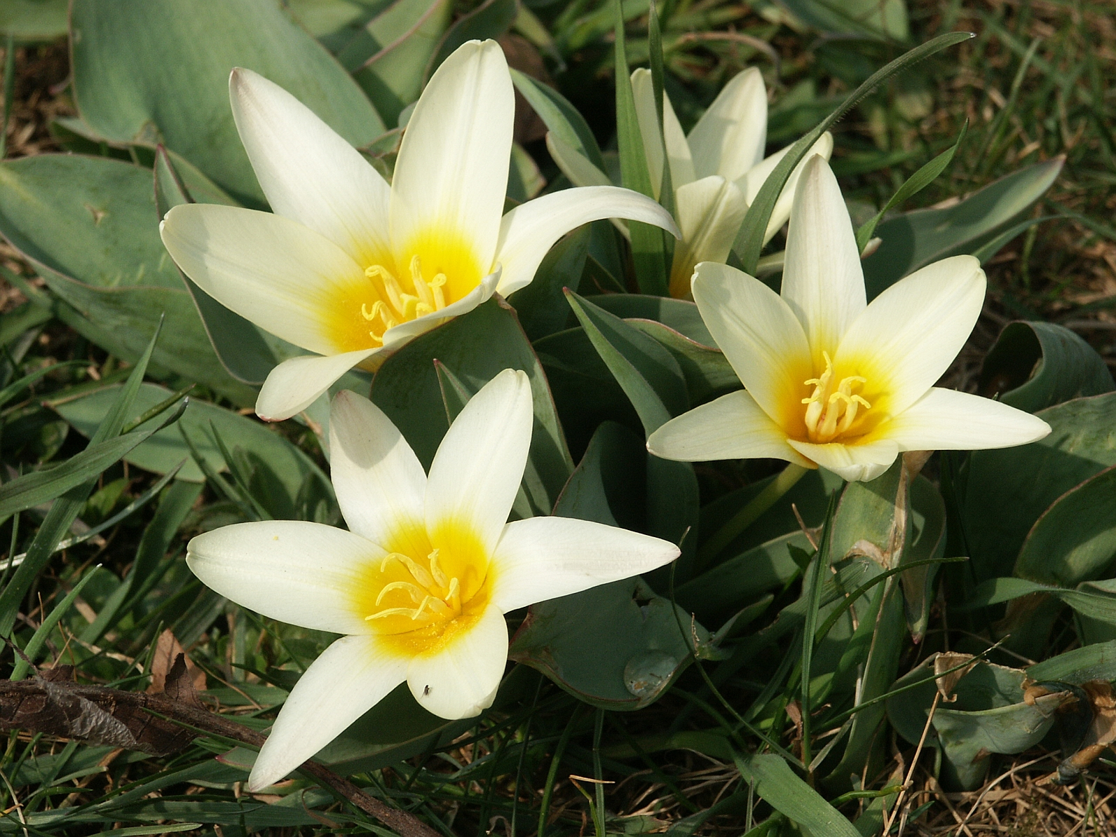 Tulipa kaufmanniana, garden